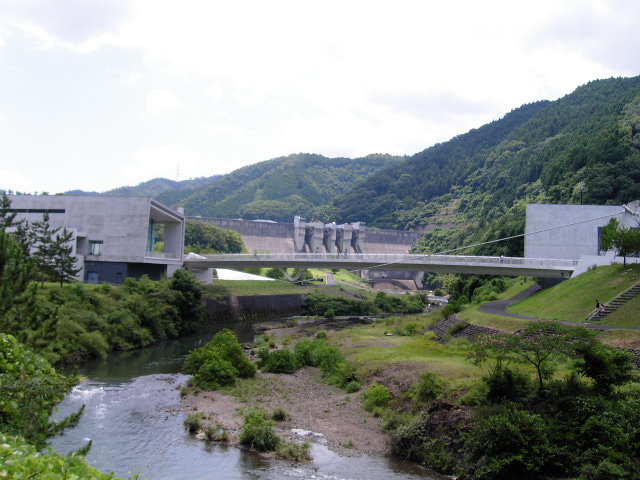 道の駅スプリングひよし(右)と、桂川を挟み対岸のひよし温泉(左)、背後に日吉ダム